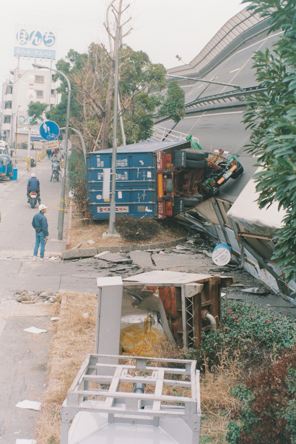 神戸市東灘区 国道43号線 深江付近